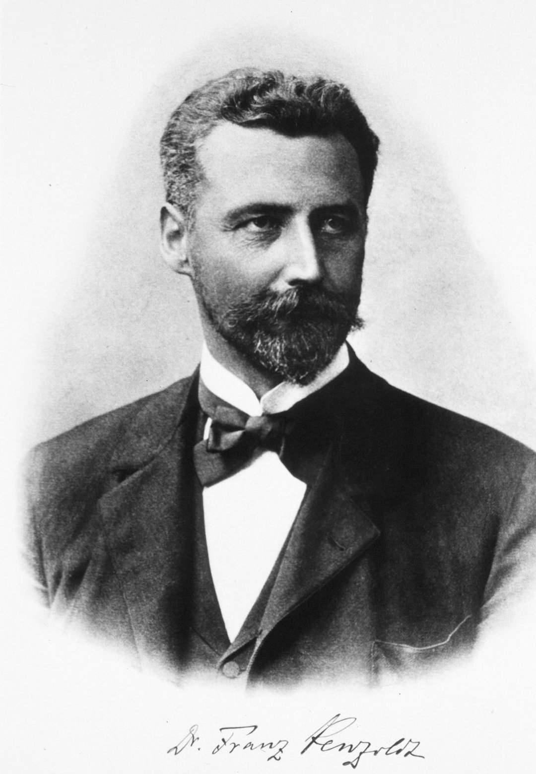 Franz Penzoldt (December 12, 1849 – September 19, 1927)